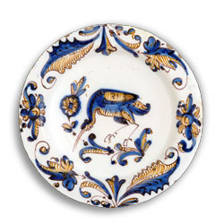 Plato talaverano de la serie tricolor del S.XVII donado por Vicente Carranza.